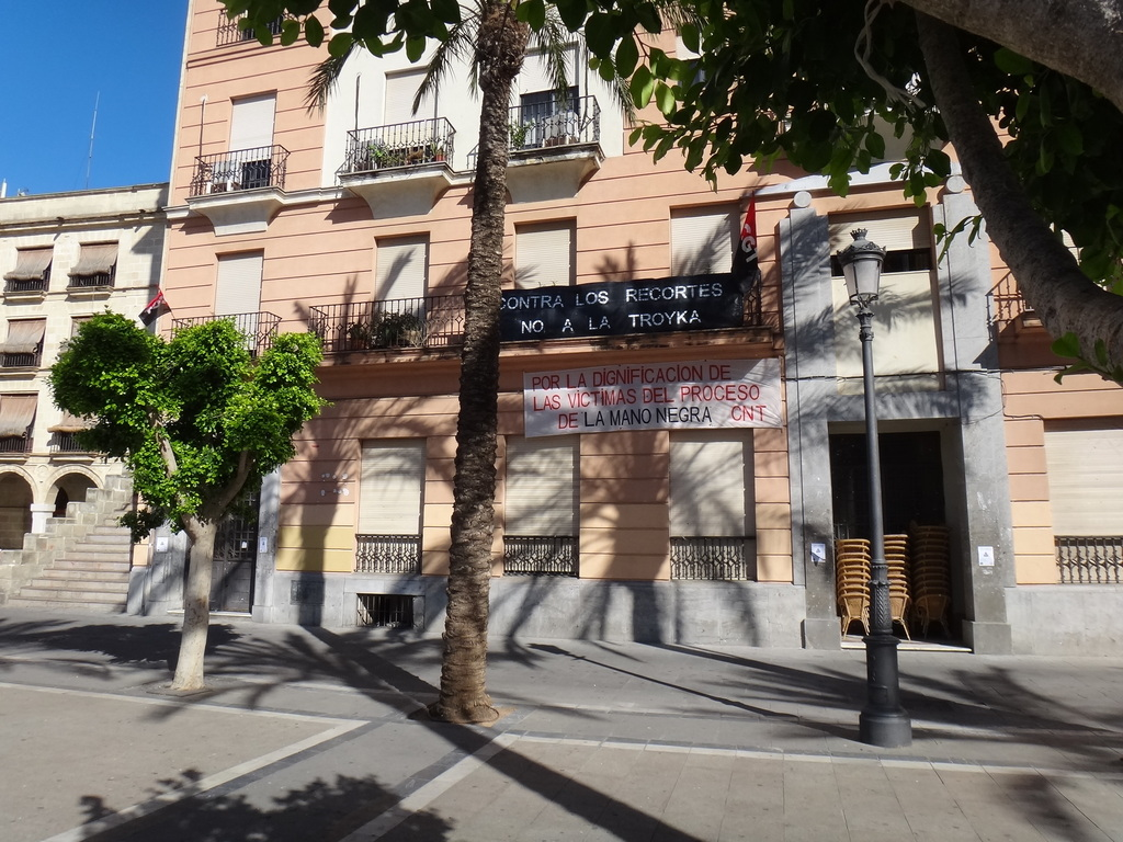 Pancarta en apoyo al proceso de dignificación de los condenados por el crimen de La Mano Negra. Edificio de los sindicatos, Jerez de la Frontera (Andalucía, España).